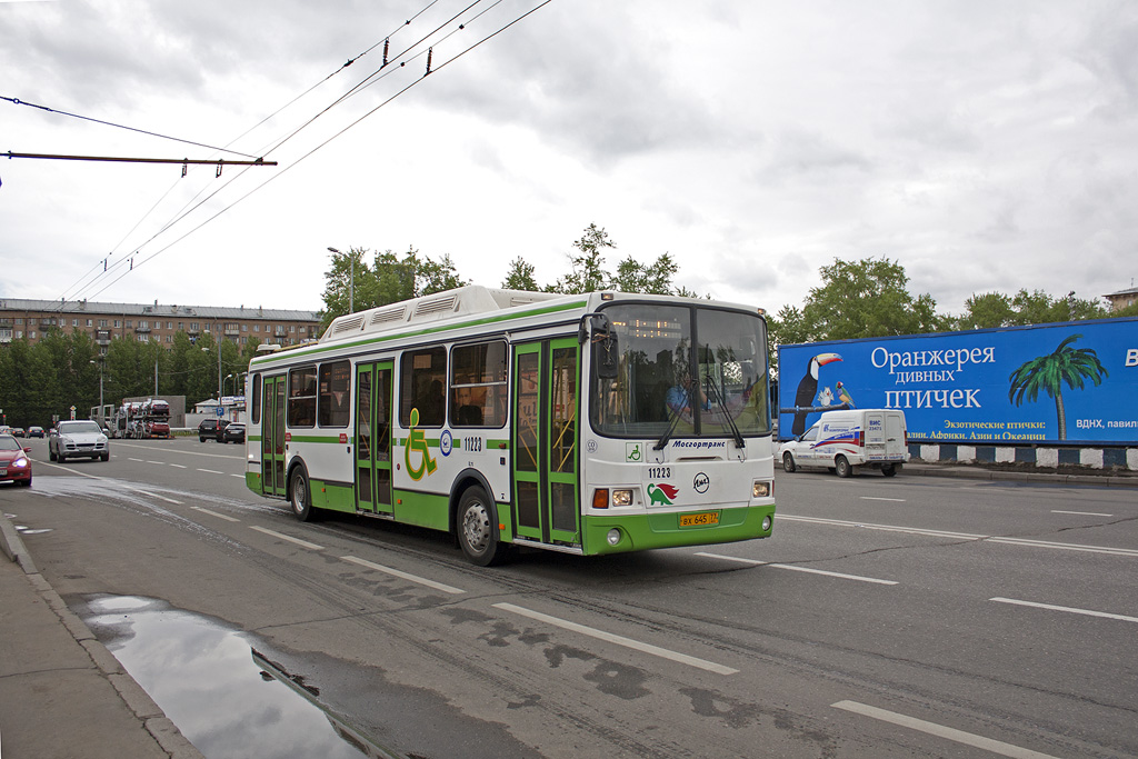 Автобус ЛиАЗ-5293.70 №11223. Москва, Продольный проезд, маршрут 154